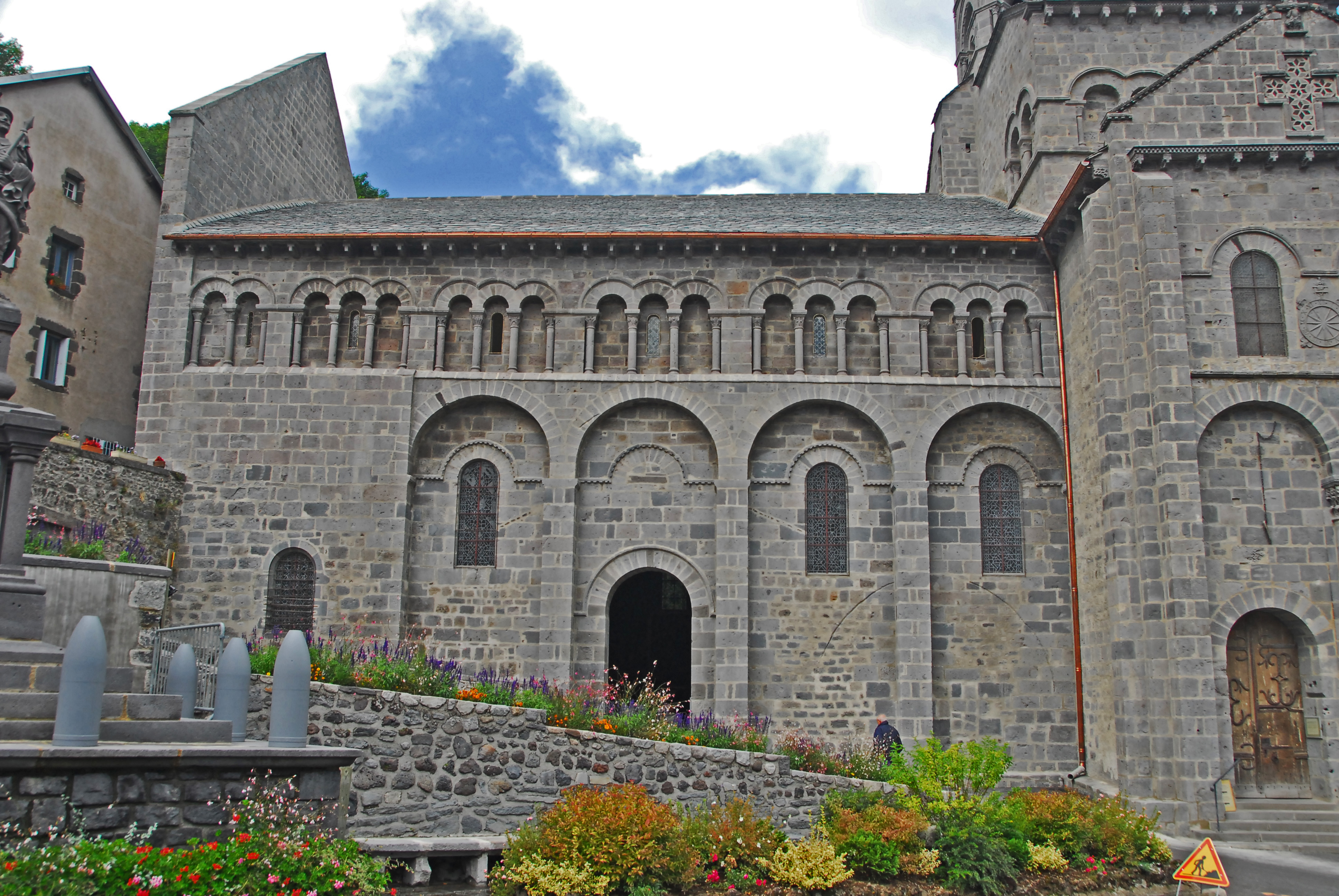 N.-D.d'Orcival, Langhaus, Südwand